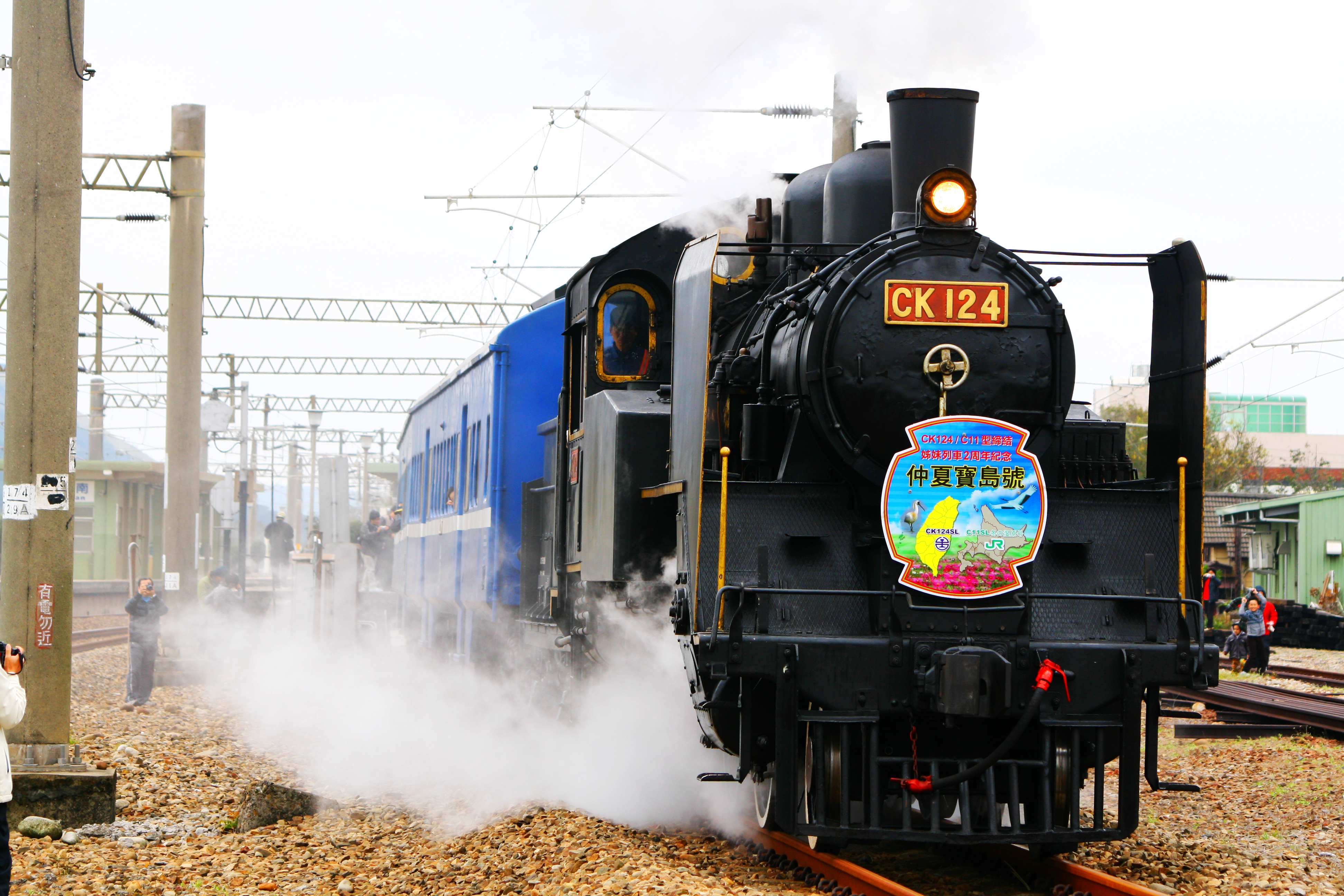 台鐵蒸汽火車CK124擔任5816次郵輪式列車，日南站開車